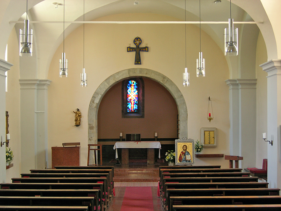 Heiligenstädter Pfarrkirche, Wien